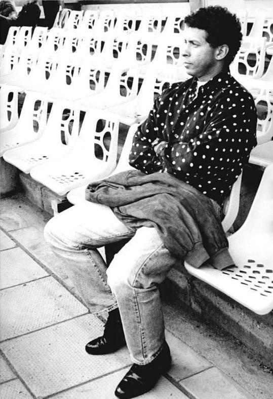 ADN-Ralf Hirschberger-13.10.90-Nordhausen: 8. Spieltag der Fußballoberliga Nord-Ost- FC Sachsen Leipzig-BSV Stahl Brandenburg 3:3 (1:2) Sachsen-Trainer Jimmy Hartwig mußte sich das Spiel seiner Mannschaft von der Tribüne aus ansehen, weil er wegen Schiedsrichterbeleidigung während des letzten Heimspiels vom Spielfeld verbannt wurde.